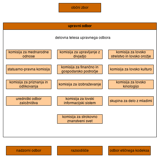 Organizacija LZS